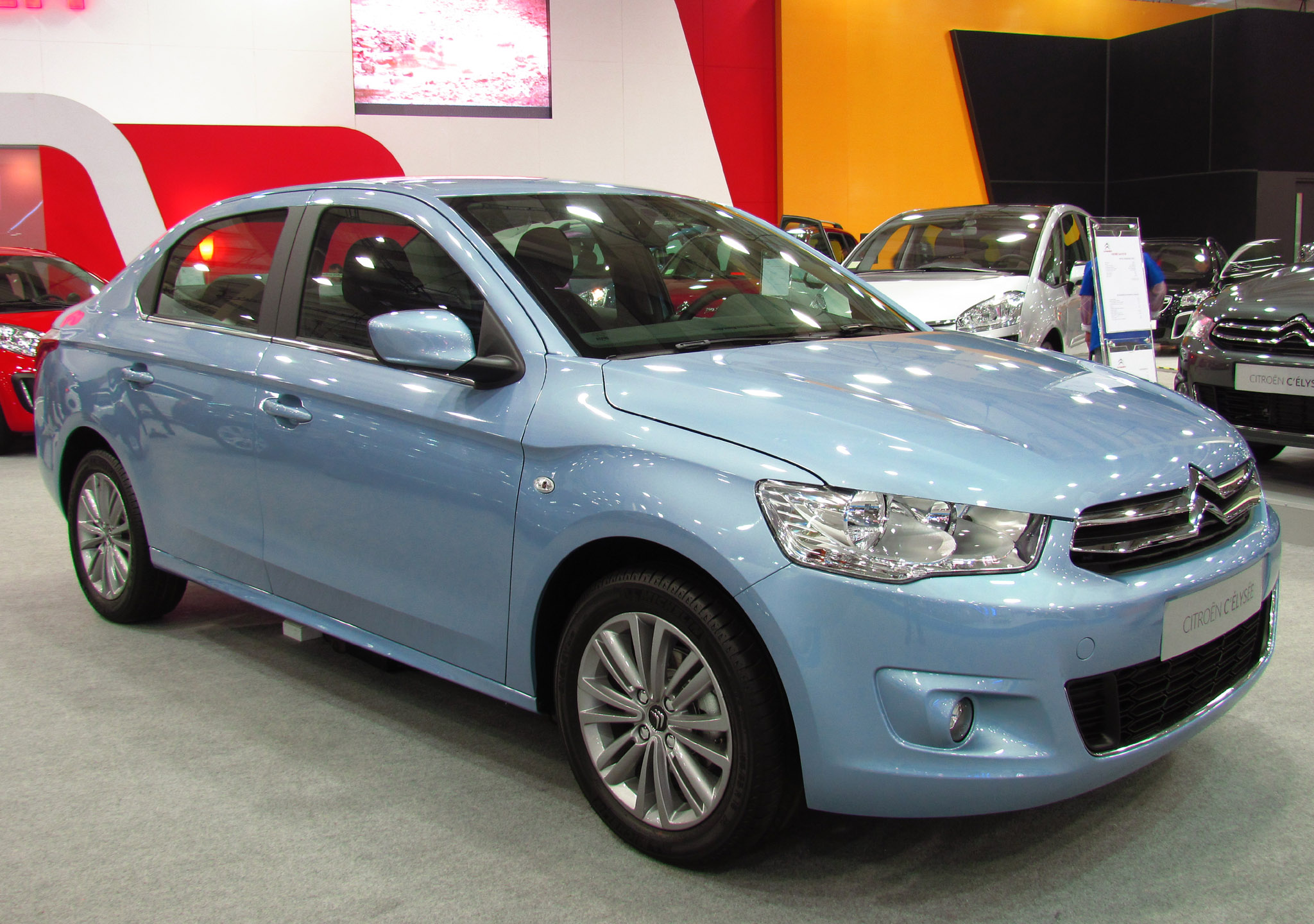 Citroen C-Elysee